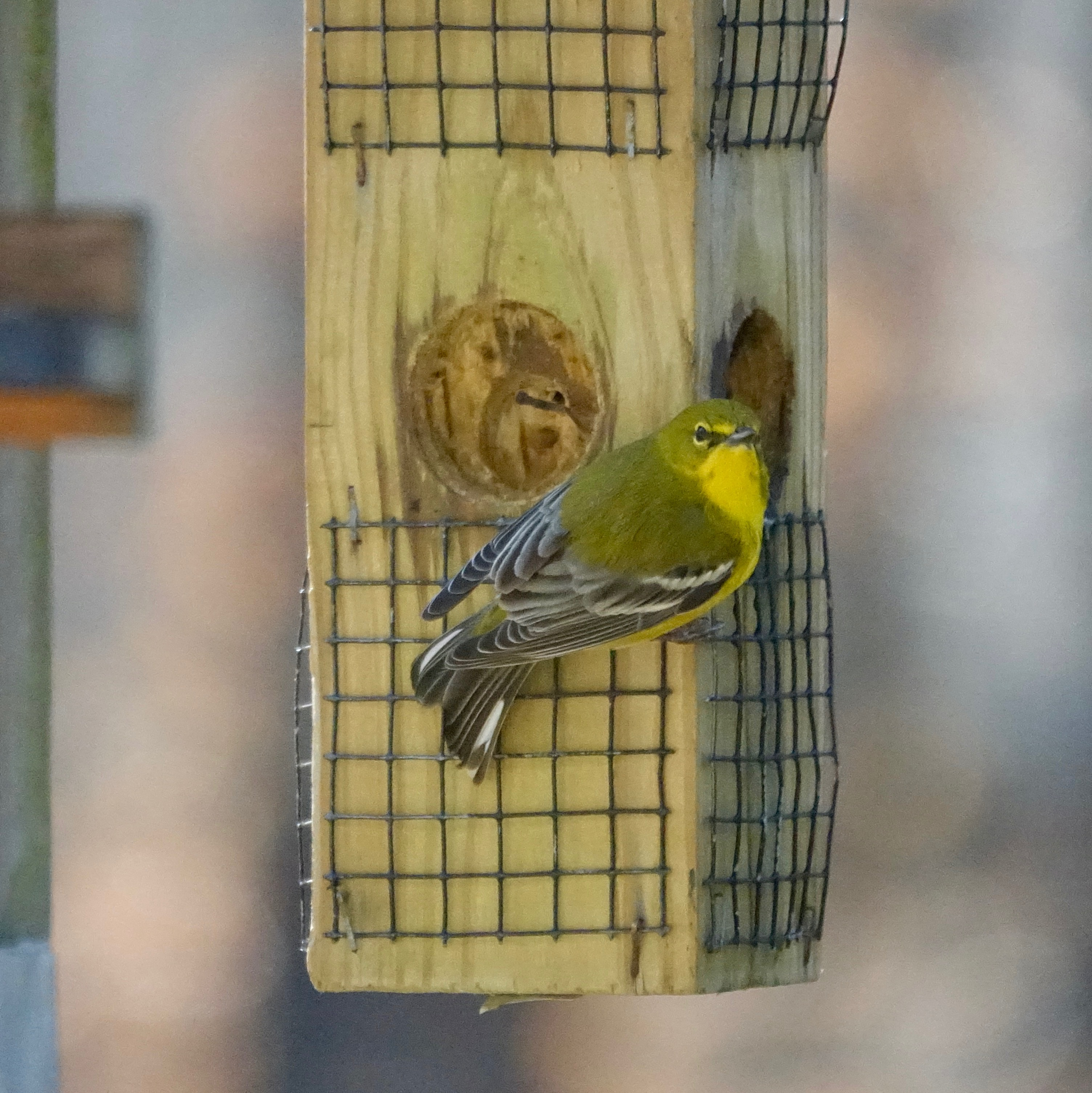 Pine Warbler